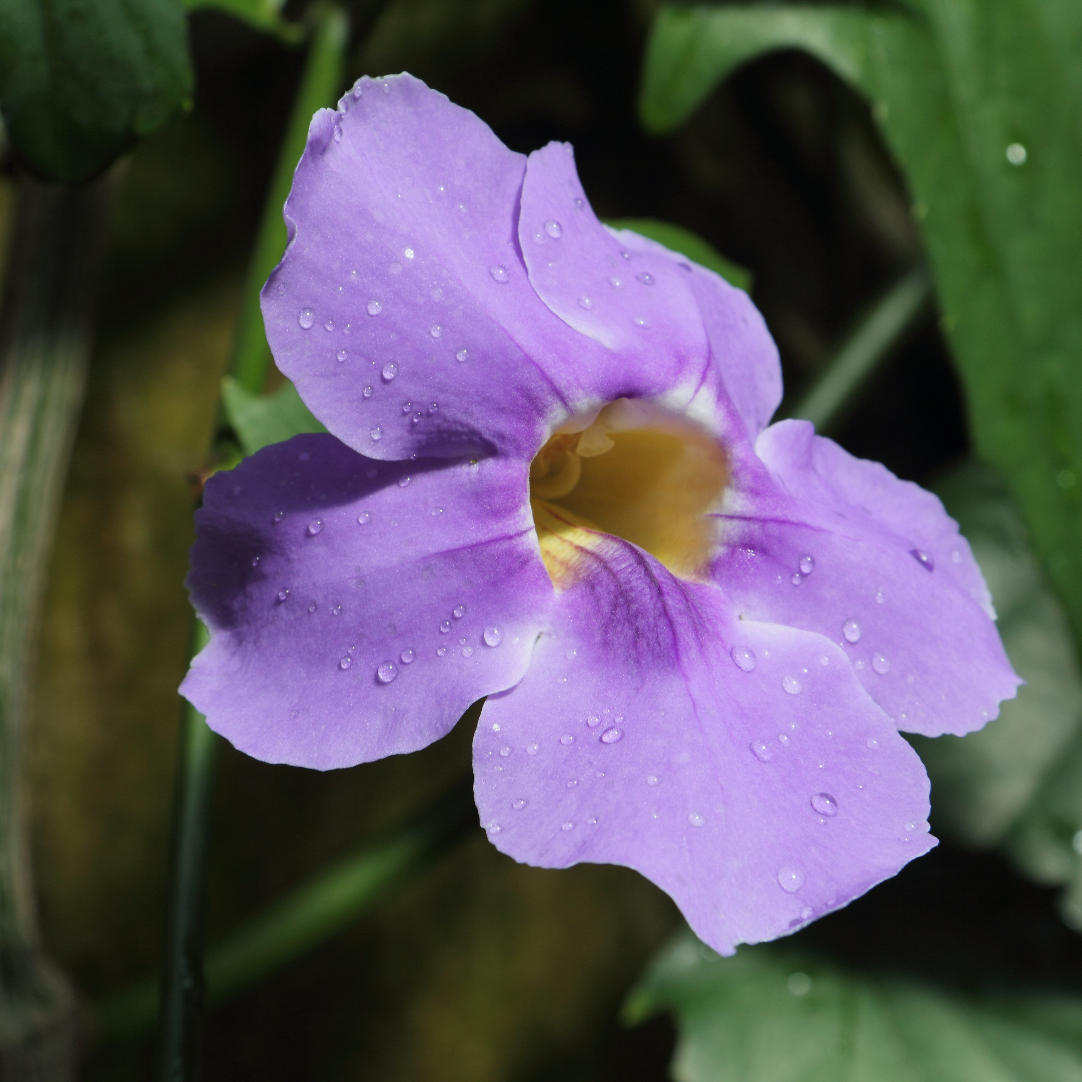 Thunbergia laurifolia, identifierad med hjälp av befintlig skylt vid Kew Gardens, London.